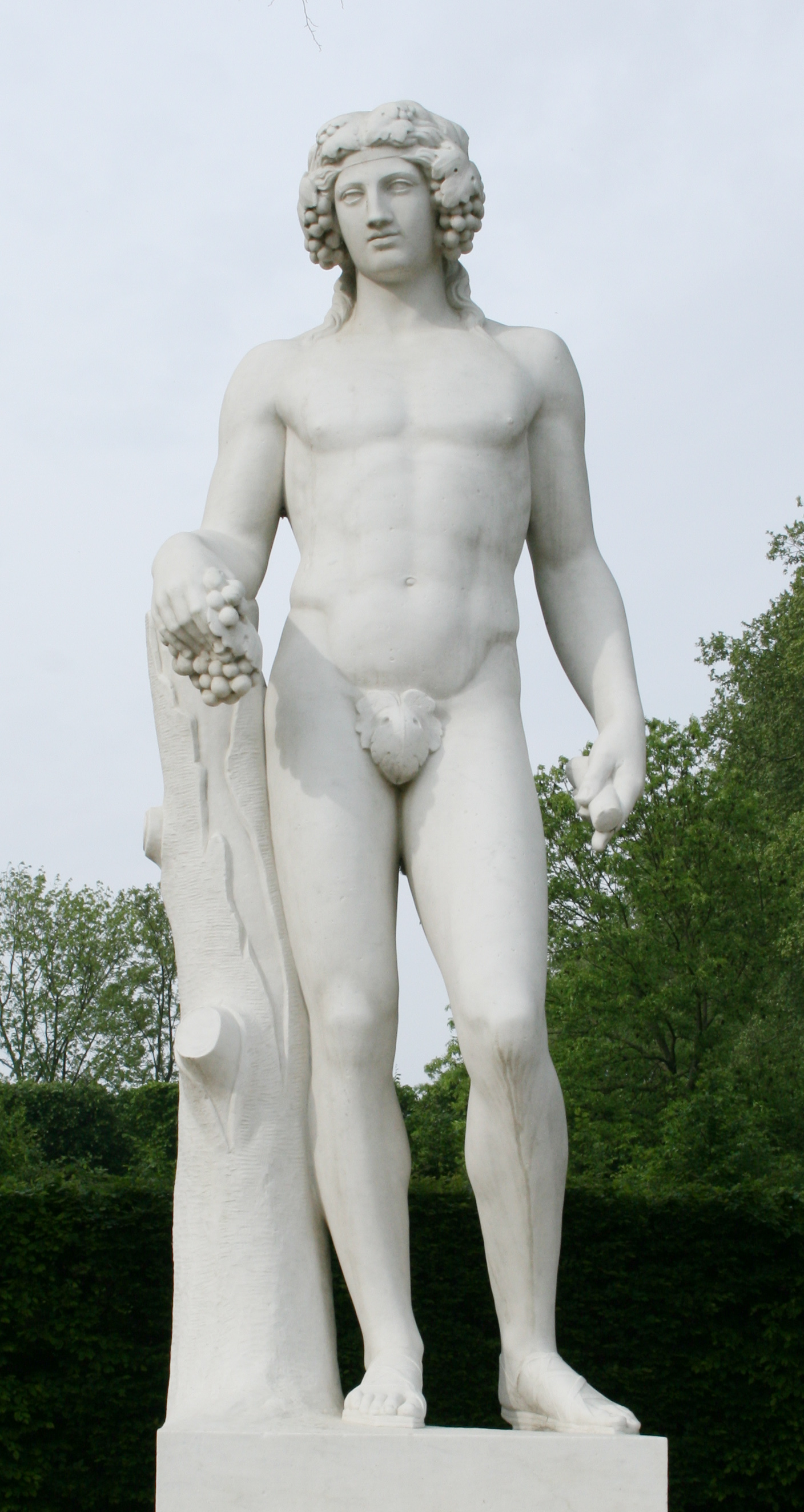 Grégoire (sculpteur français): Bacchus, statue sculptée en pierre, demi-lune du Bassin d'Apollon dans les jardins du château de Versailles.